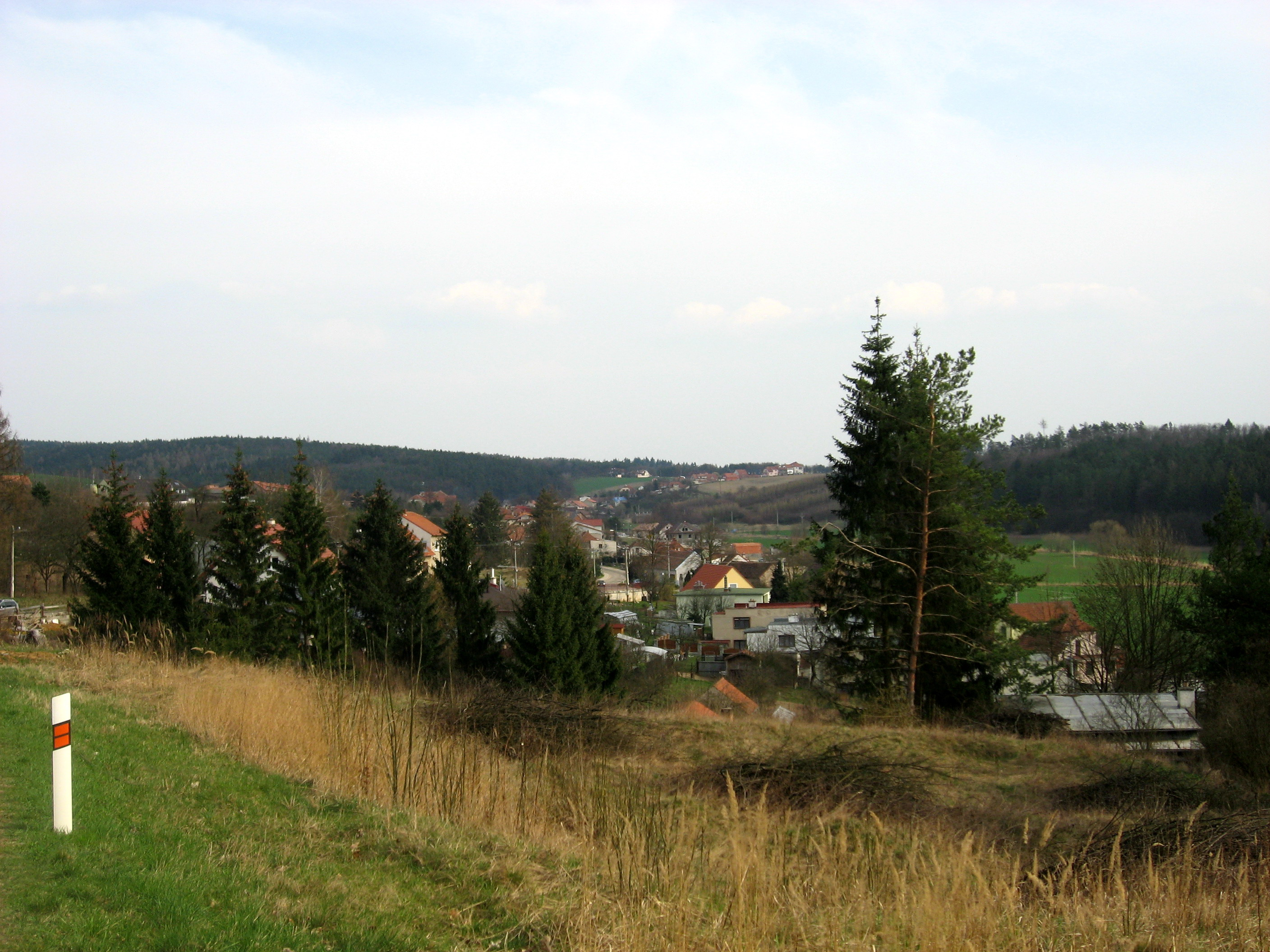 Hostěnice